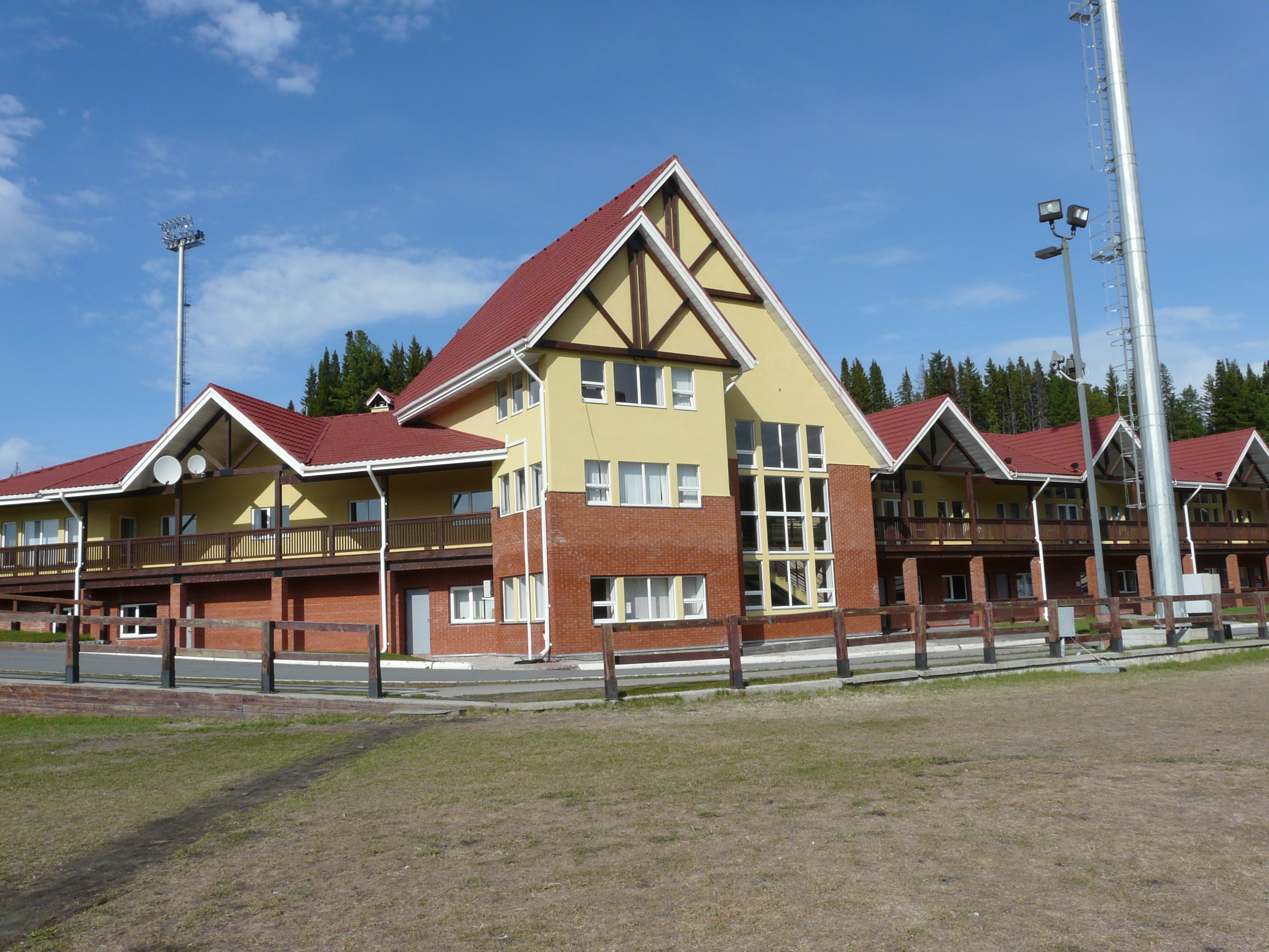 Биатлонный центр в Ханты-Мансийске